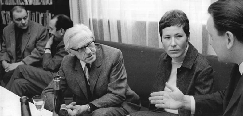 Berlin, Will-Lammert-Preis an M. Middell Zentralbild Franke 15.4.69 Berlin: Will-Lammert-Preis 1969 verliehen Der alle zwei Jahre an junge Bildhauer der DDR verliehene Will-Lammert-Preis für den künstlerischen Nachwuchs von der Deutschen Akademie der Künste zu Berlin, wurde am 15.4.69 an die Bildhauerin Magret Middell (2.v.r.) vergeben. Die ehemalige Schülerin von Prof. Drake (l.) ist mit ihren Werken besonders auf der VI.Deutschen Kunstausstellung hervorgetreten. Rechts: Gerhard Hallmann stellv. Abteilungsleiter der Abteilung Bildende Kunst der DAK zu Berlin. [Heinrich Drake, Magret Middell, Gerhard Hallmann] Abgebildete Personen: Drake, Heinrich Prof.: Bildhauer, DDR